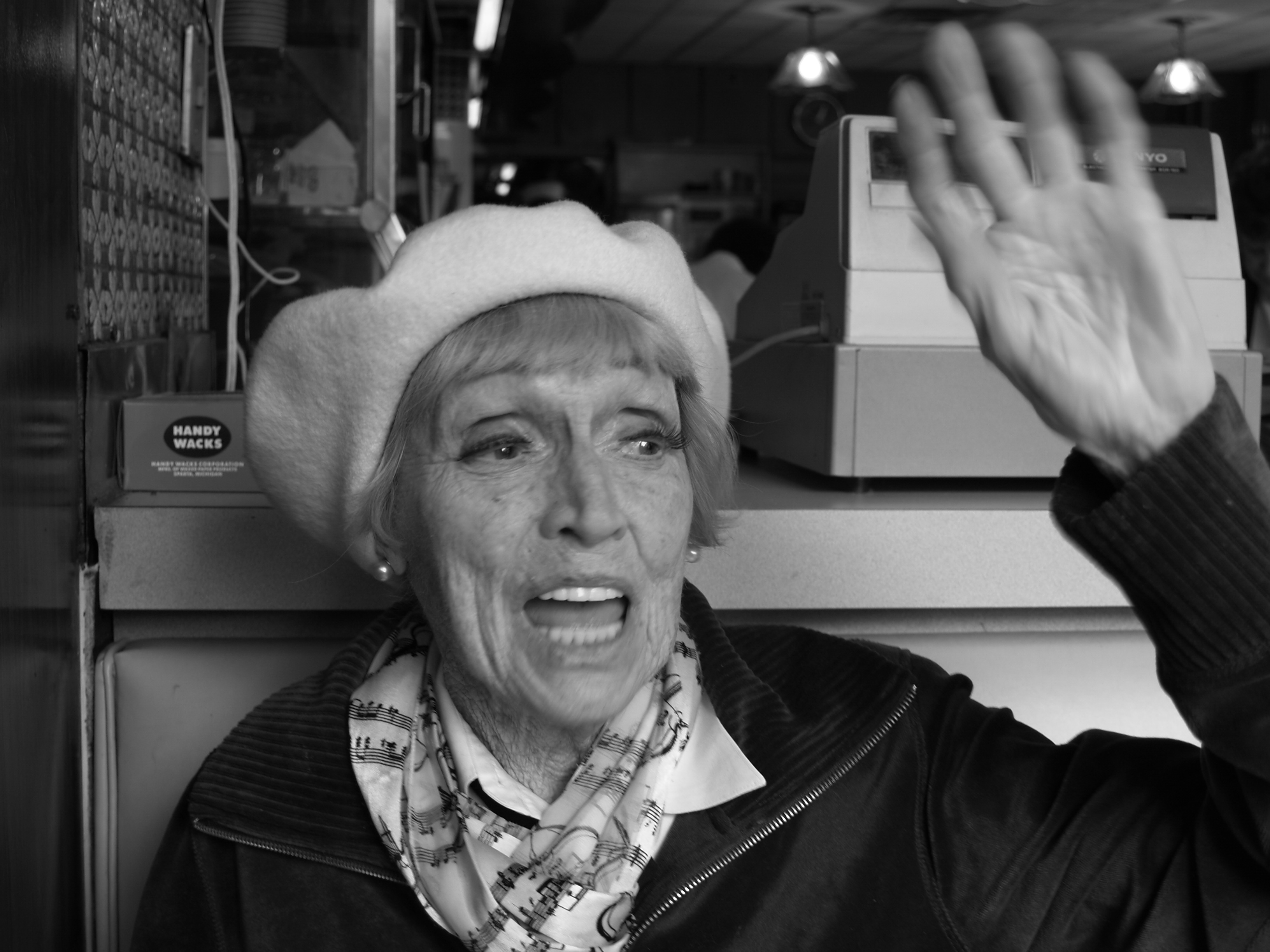 Anita O'Day